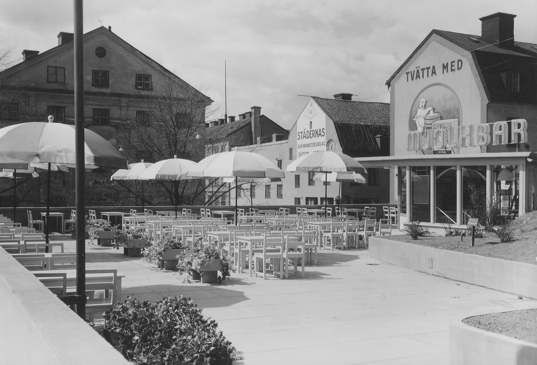 Mjölkbar, Björns trädgård. Byggnadsår 1936. Arkitekt Holger Blom. [1]